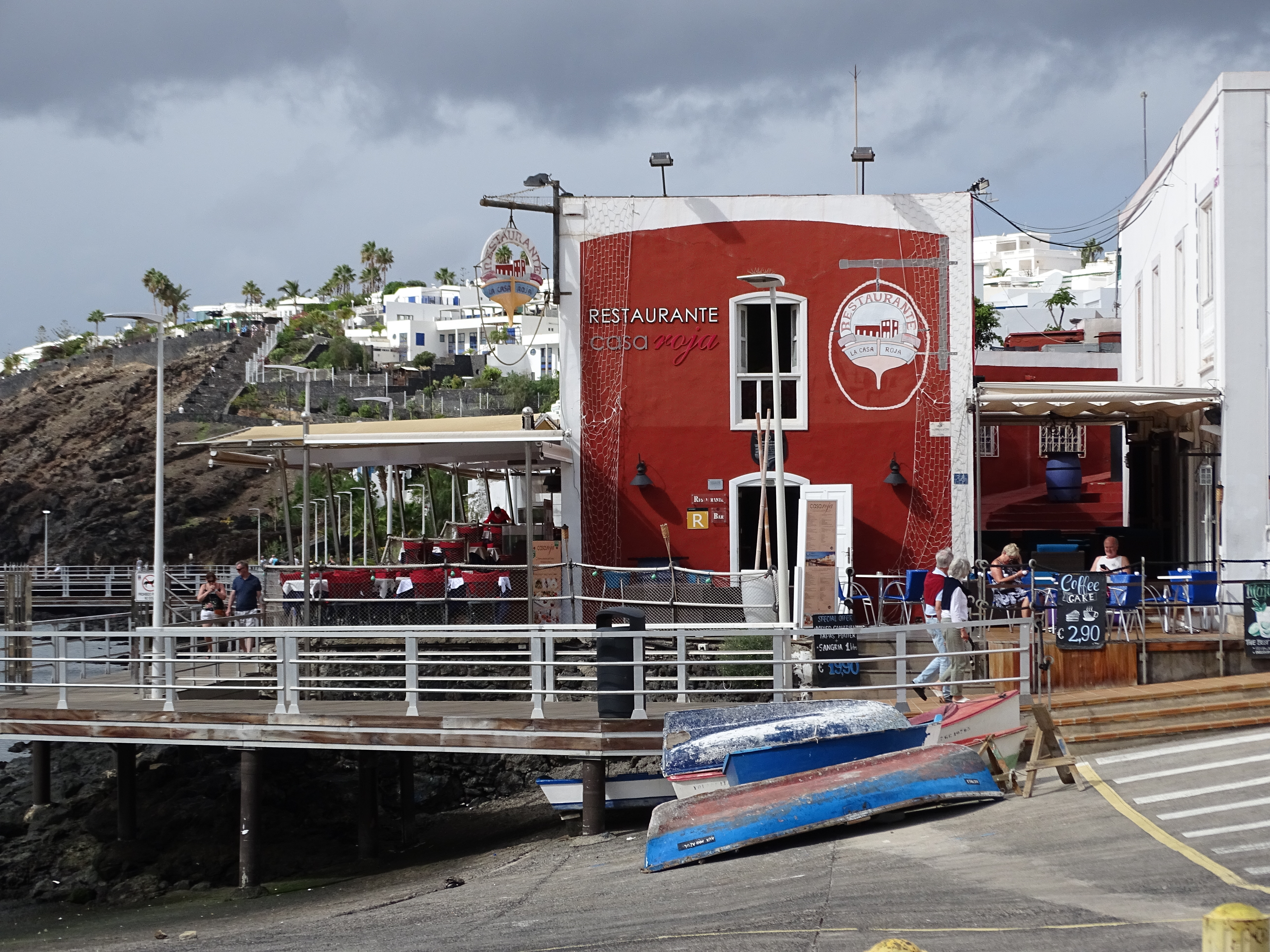 Das alte Restaurant "La casa roja" (Das rote Haus) im Hafen von Puerto del Carmen, Lanzarote